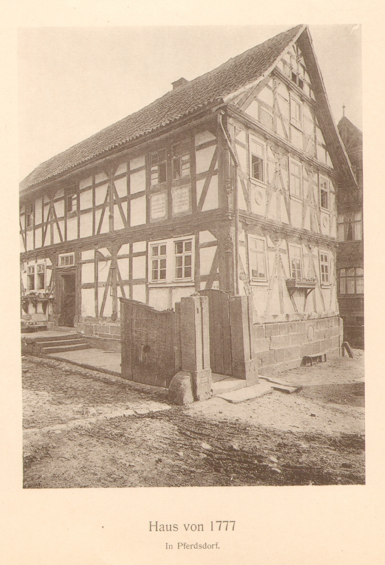 Fachwerkhaus in Pferdsdorf/Röhn (um 1777)